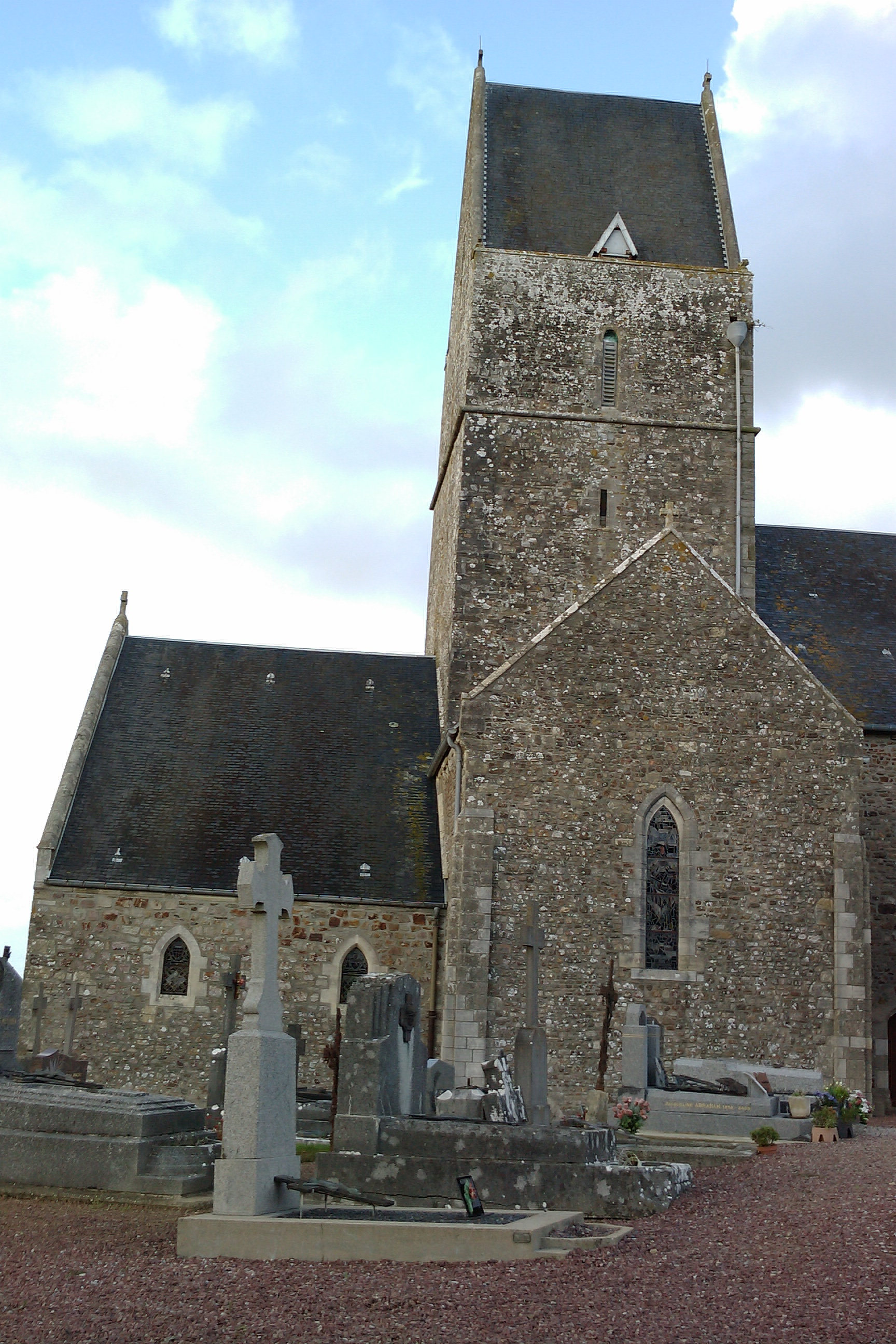 Église de Montgardon